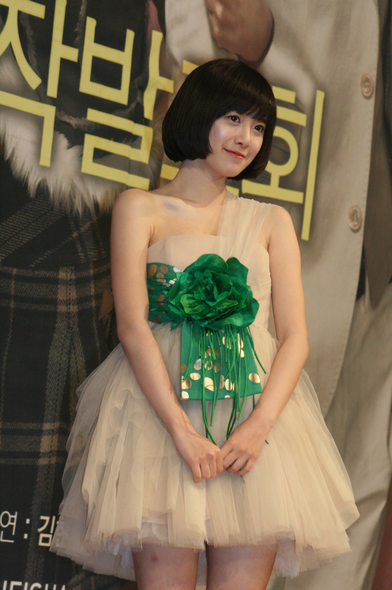 2008년 12월 22일 서울 롯데호텔에서 열린 《꽃보다 남자》 제작발표회에서의 구혜선.